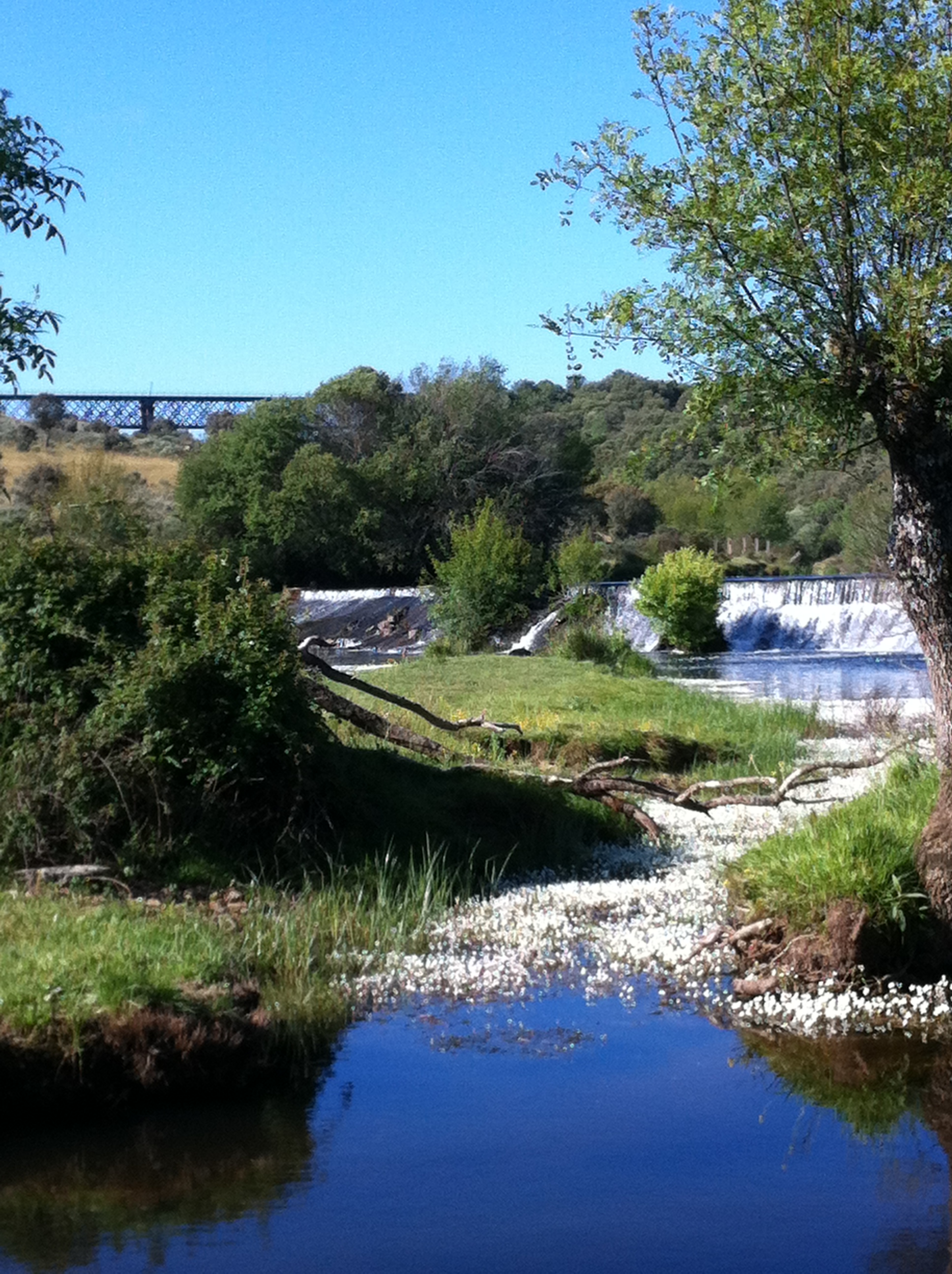 Riberas de los ríos Huebra, Yeltes, Uces y afluentes This is a photography of a Site of Community Importance in Spain with the ID: ES4150064. Natura2000 entry, EEA entry